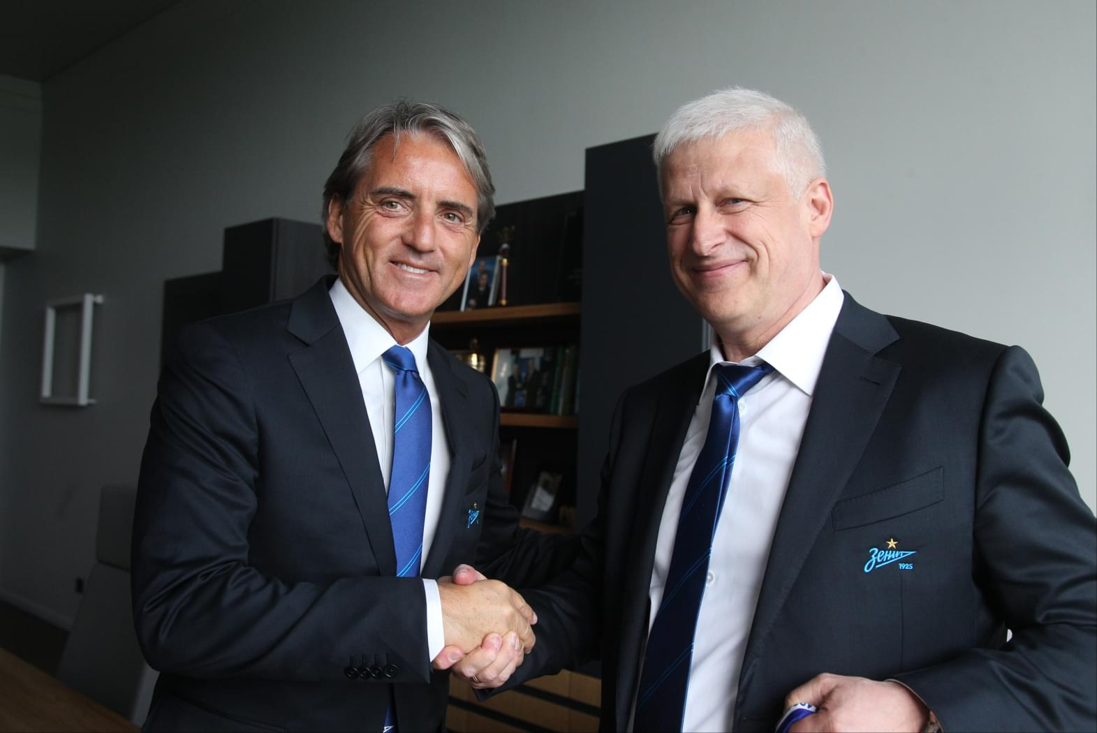 13.06.2017. Россия, Санкт-Петербург. Встреча в Клубе Председателя правления ФК «Зенит» Сергея Александровича Фурсенко и главного тренера «Зенита» Роберто Манчини.